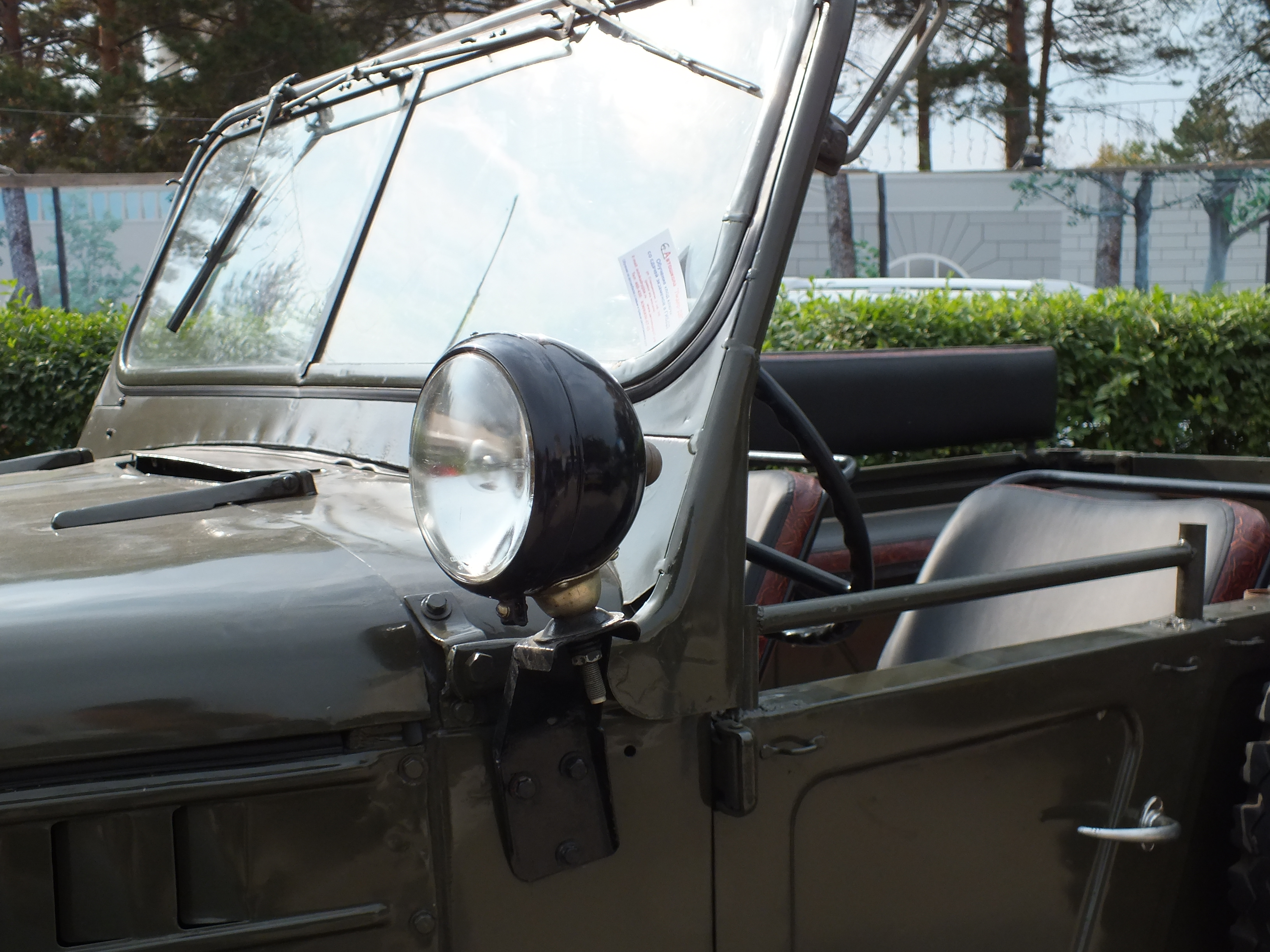 GAZ-69